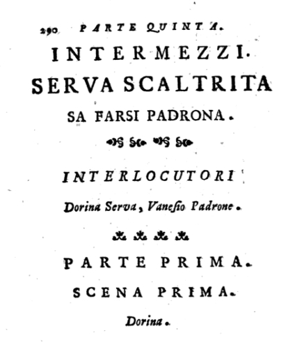 Frontespizio